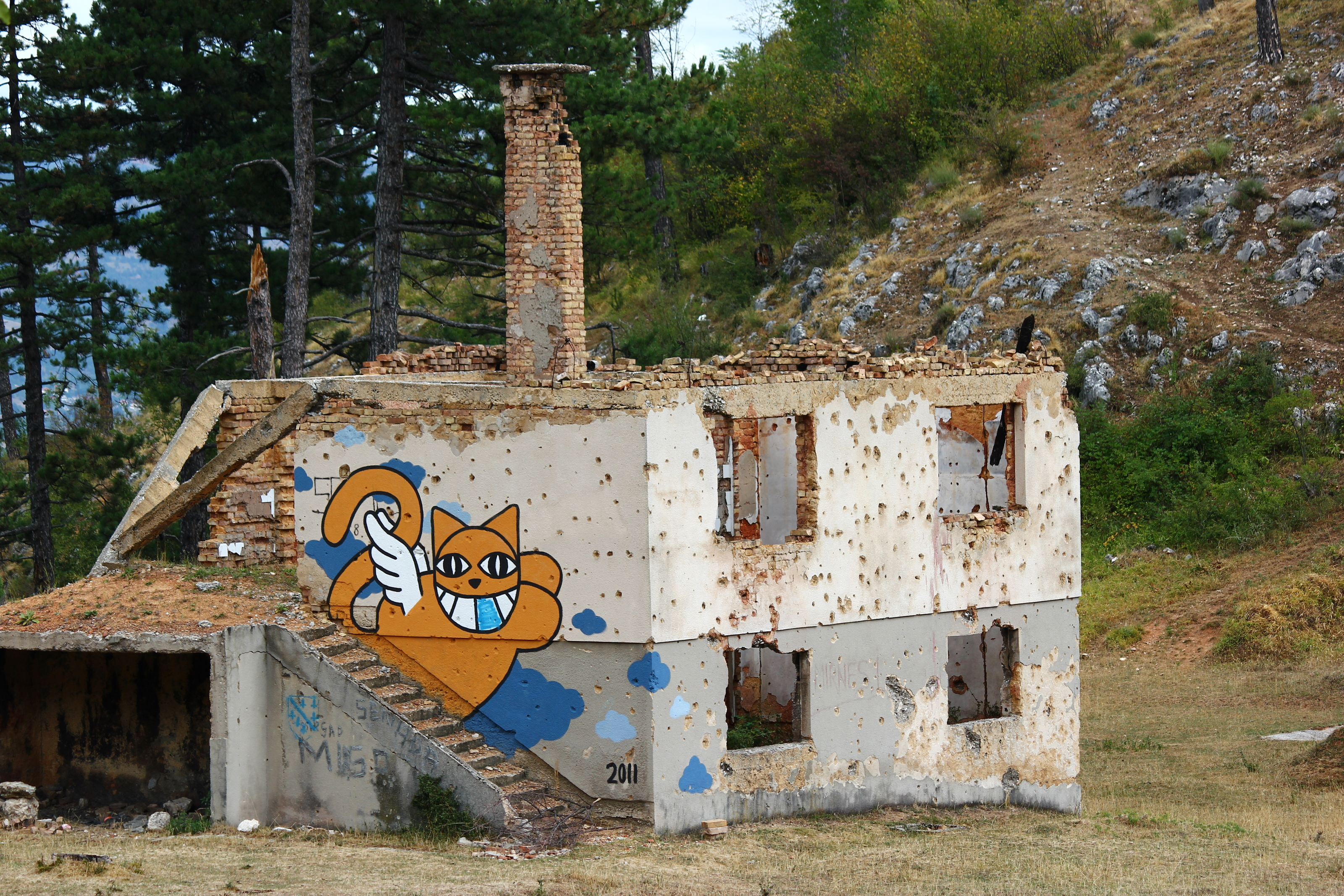 Graffiti auf einer Ruine am Trebević oberhalb von Sarajevo.